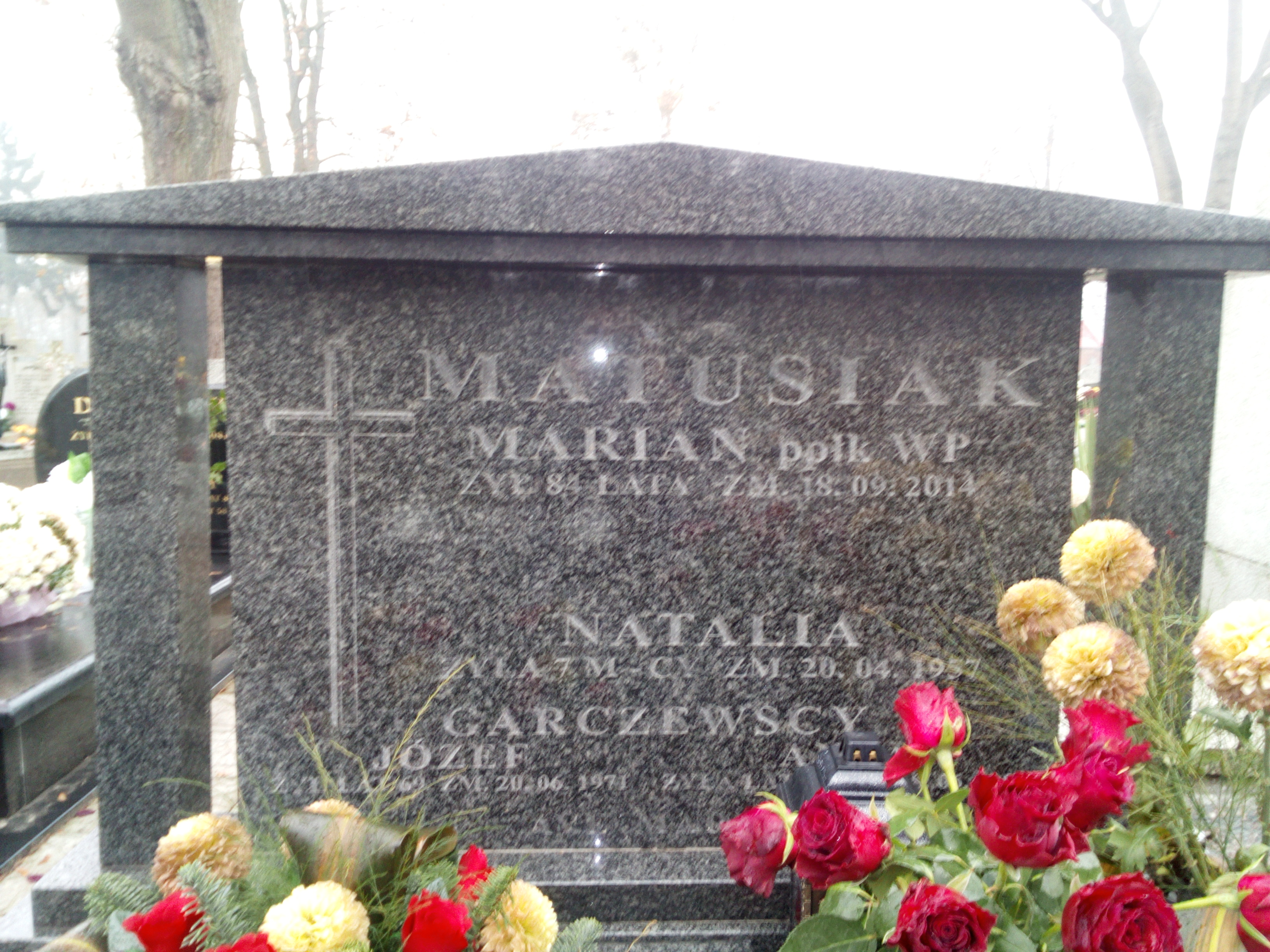 Grób ppłk. Mariana Matusiaka na włocławskim cmentarzu komunalnym.